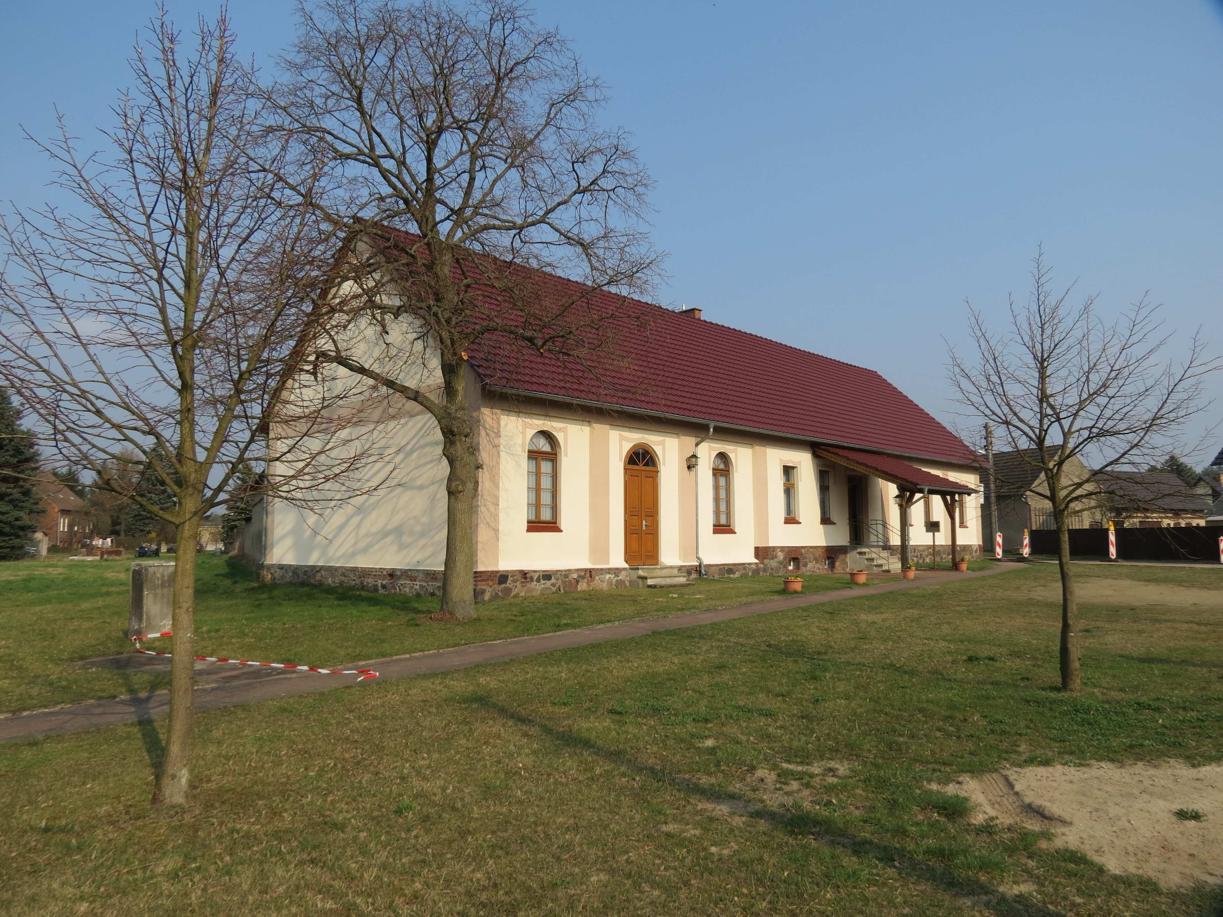 Bahnhofstraße, Gemeindehaus, Ullersdorf, Ortsteil der Gemeinde Jamlitz, Lanskreis Dahme-Spreewald, Brandenburg, Deutschland